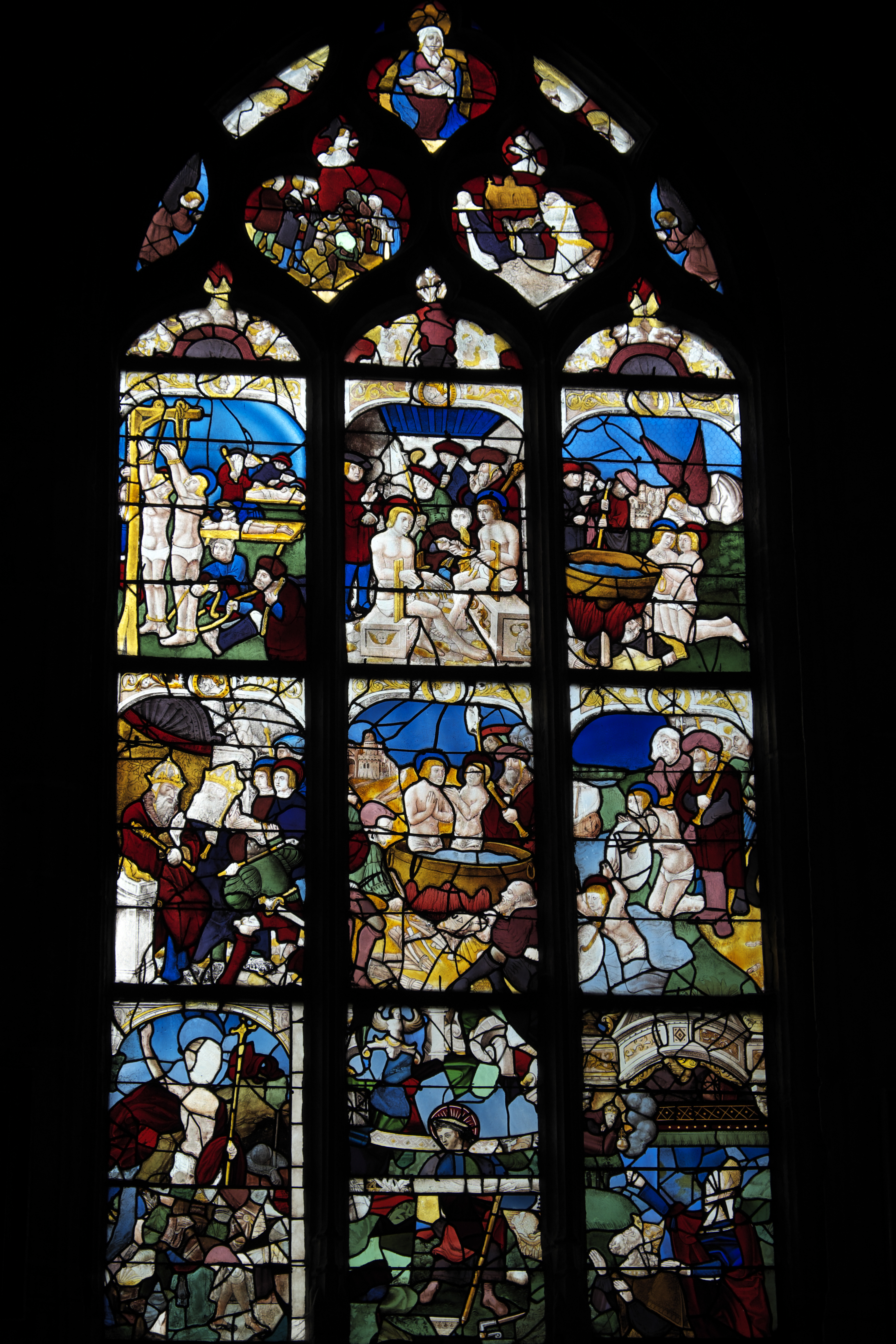 Katholische Kirche Saint-Pierre in Dreux im Département Eure-et-Loir (Centre-Val de Loire/Frankreich), Bleiglasfenster in der Kapelle Saint-Crépin und Saint-Crépinien aus dem 16. Jahrhundert; Darstellung: Martyrium der Brüder Crispinus und Crispinianus